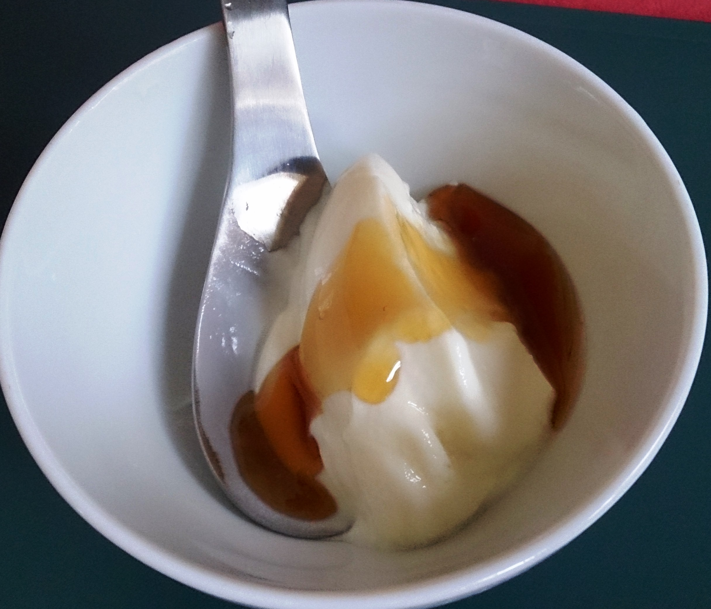 yum yum